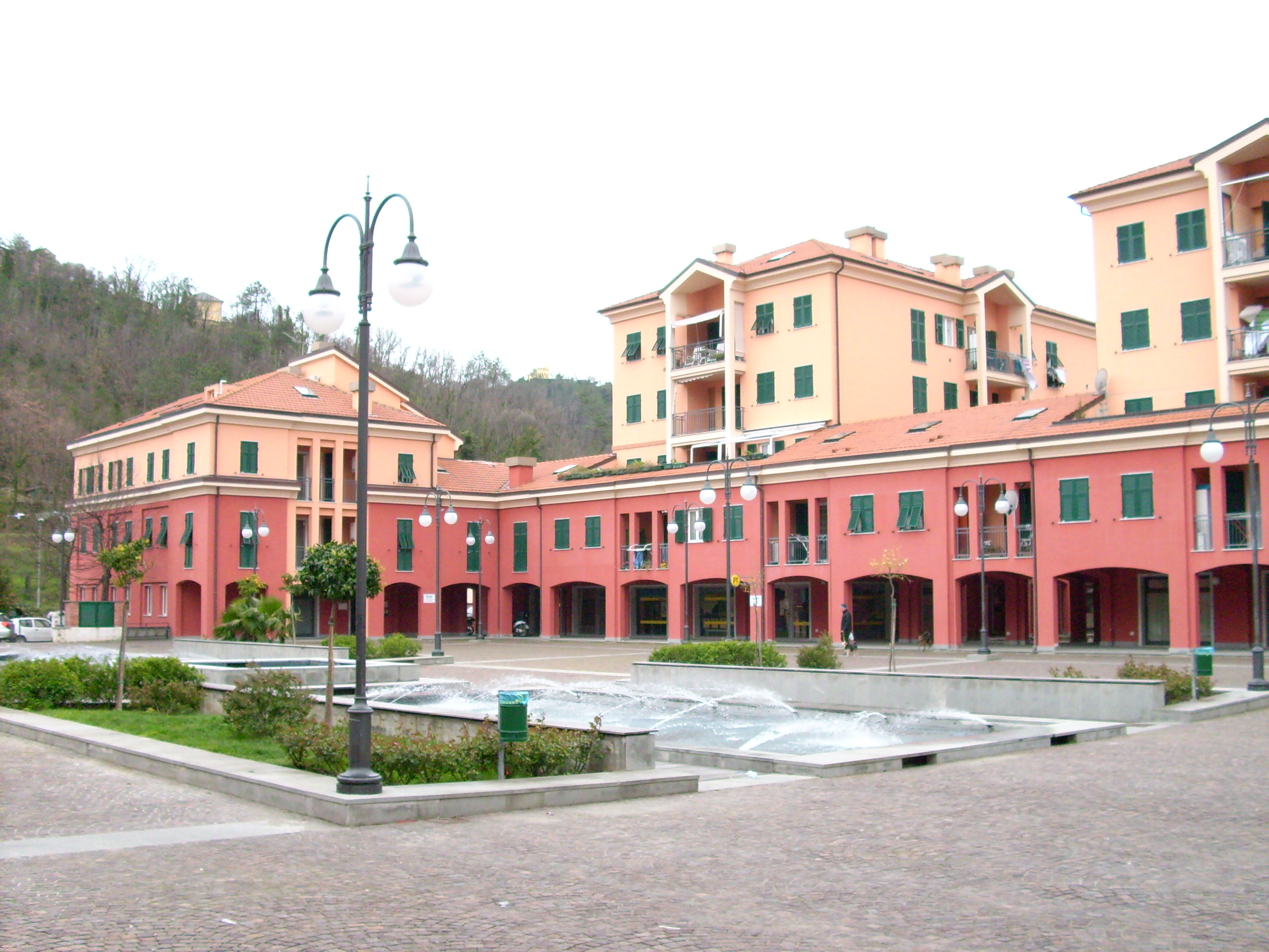 Piazza Aldo Moro di Casarza Ligure, Liguria, Italia